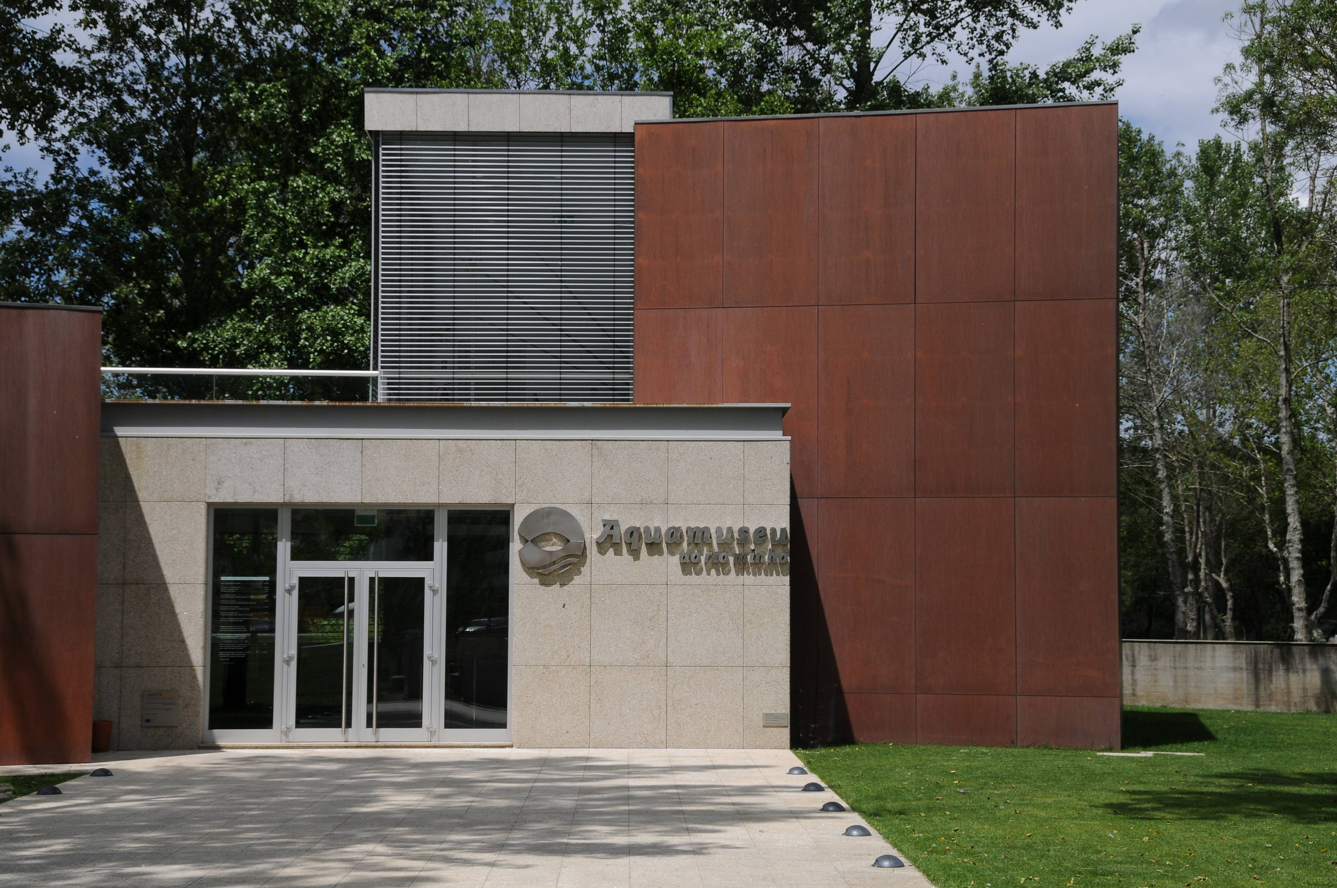 Aquomuseu Rio Minho in Vila Nova de Cerveira, Portugal